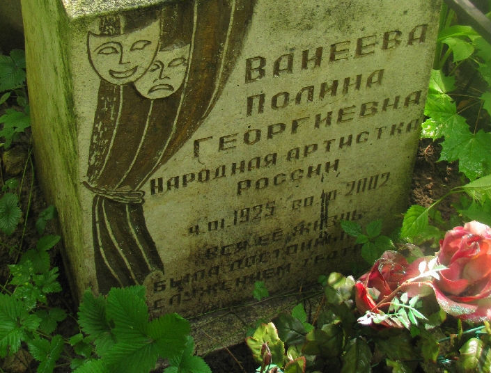 Могила Народной артистки РСФСР Полины Георгиевны Ванеевой на Пятницком кладбище Калуги